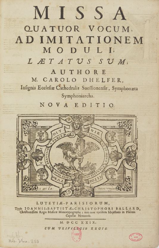 Title page of Charles d'Helfer's Missa Laetatus sum (Paris, 1729)